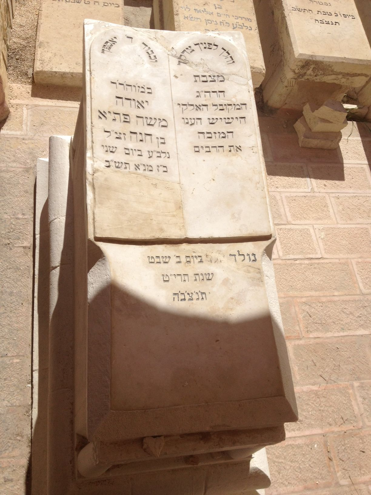 .ציון קברו של רבי יהודה פתיה הר הזיתים, ירושלים.